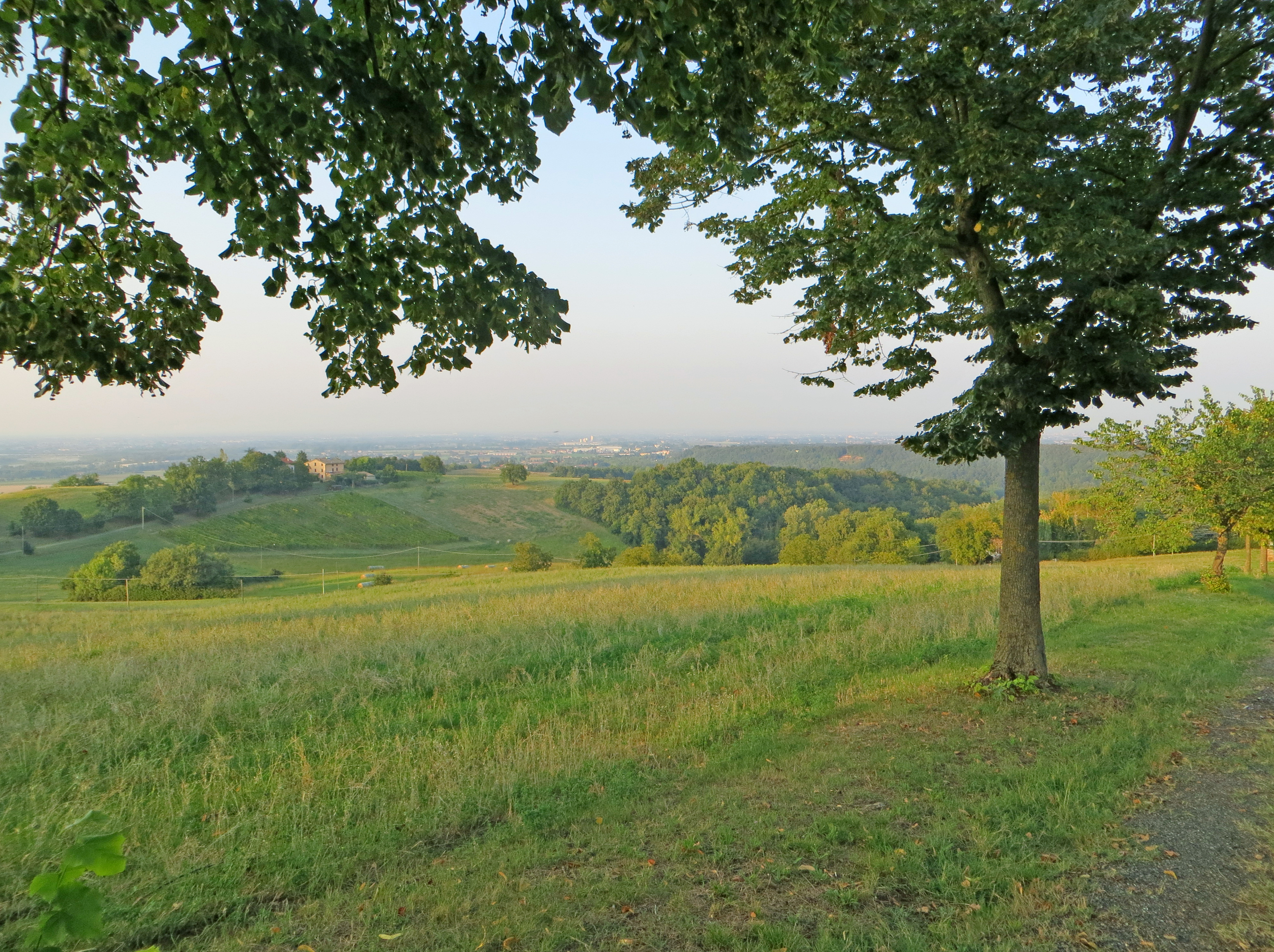 Panorama sulla Pianura Padana dal castello di Segalara This is a photo of a monument which is part of cultural heritage of Italy.